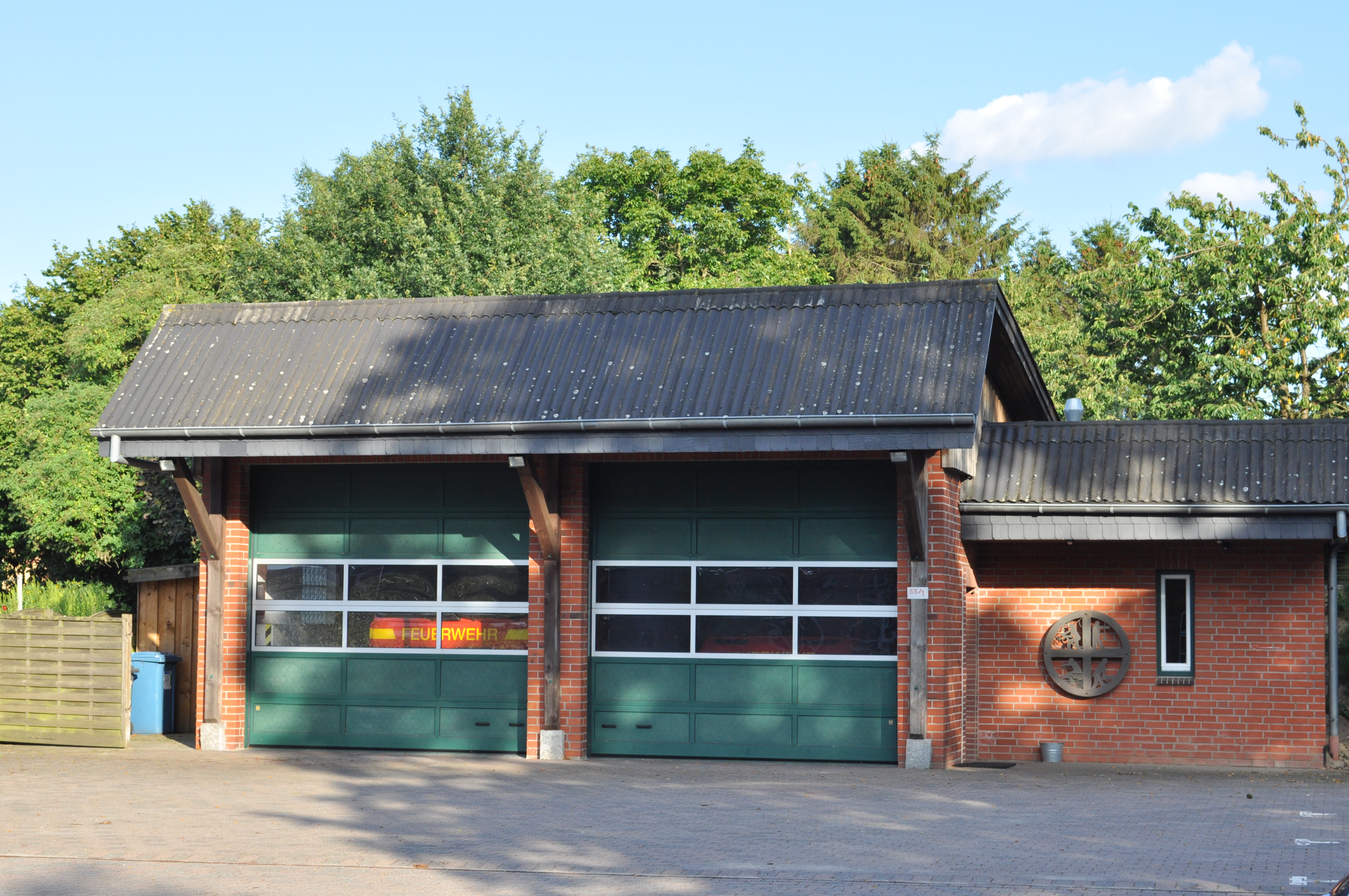 Freiwillige Feuerwehr Nienwohld.